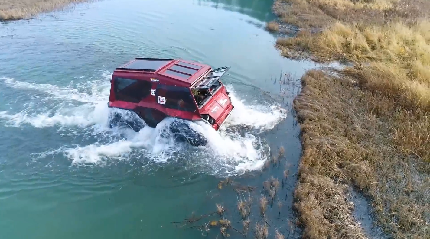 Вездеход-амфибия БигБо